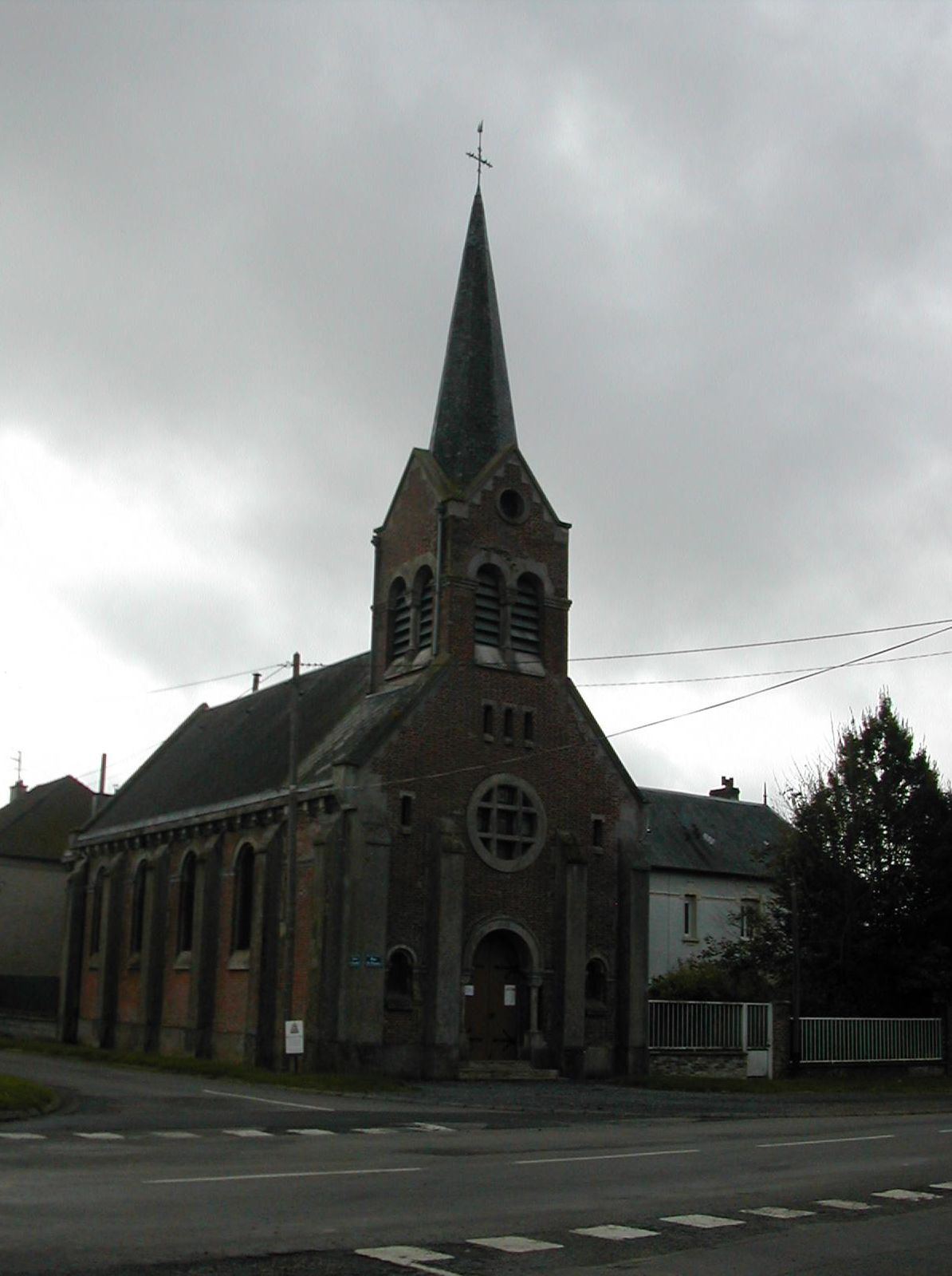 Église d'Ablainzevelle